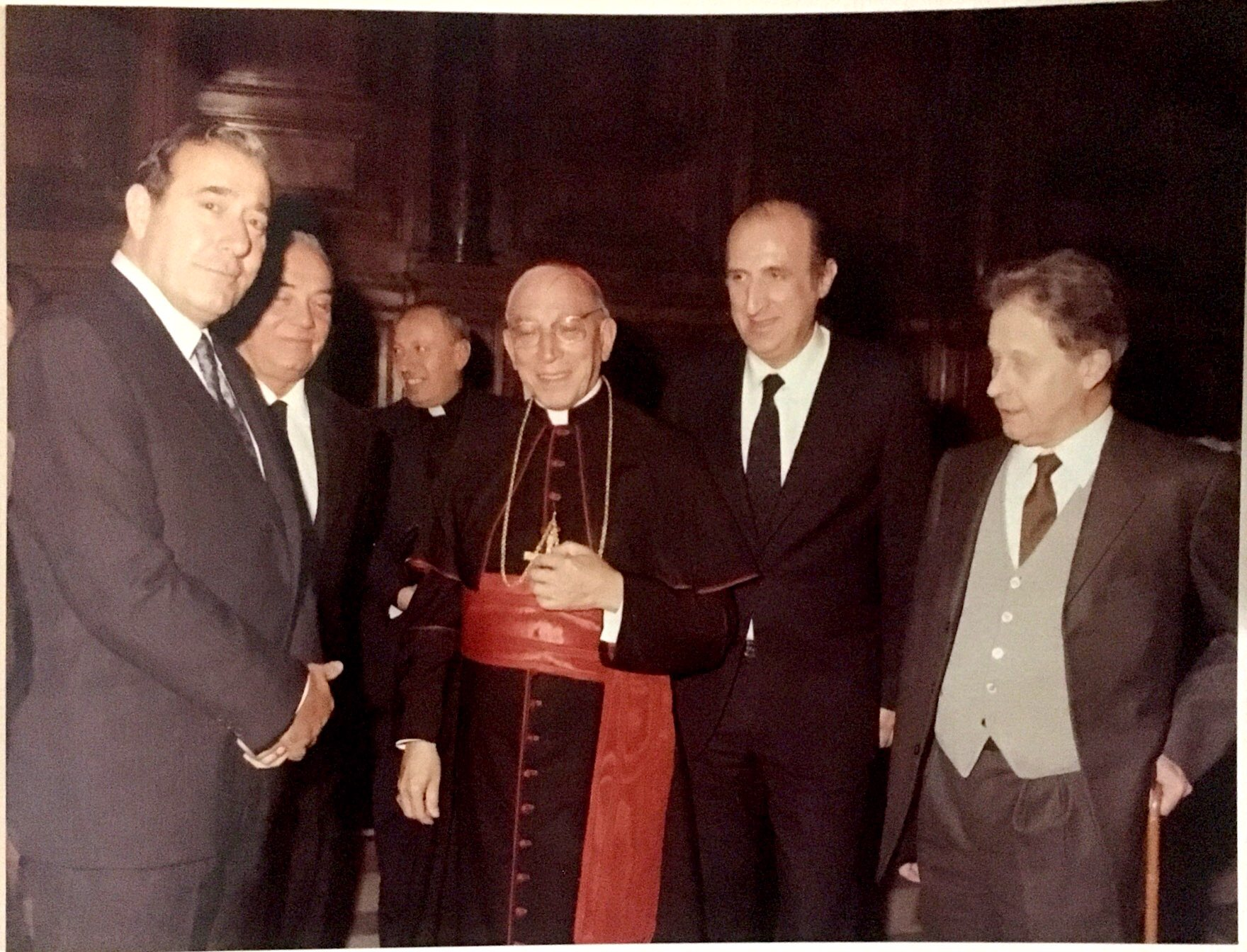 Dante alimenti,cardinal casaroli,biagio agnes emilio rossi